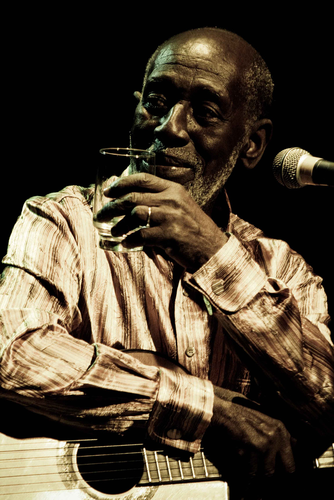 Show no Sesc Esquina, 2/12/2007